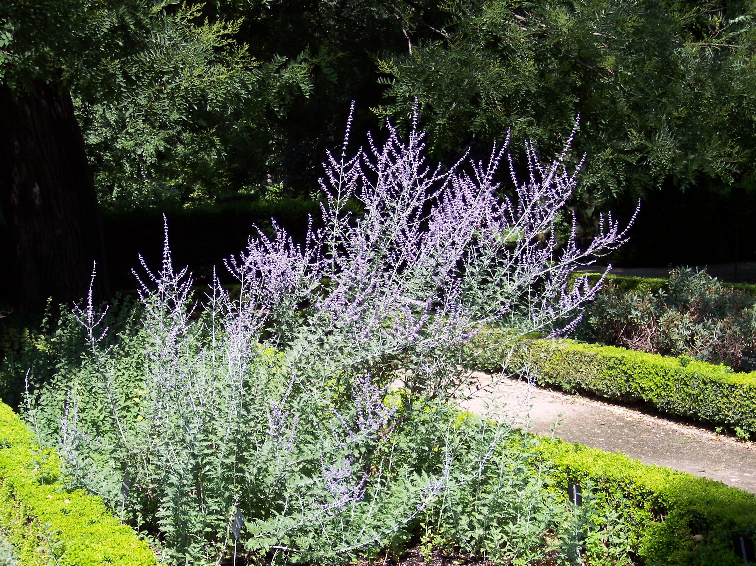 Perovskia atriplicifolia. Real Jardín Botánico de Madrid.